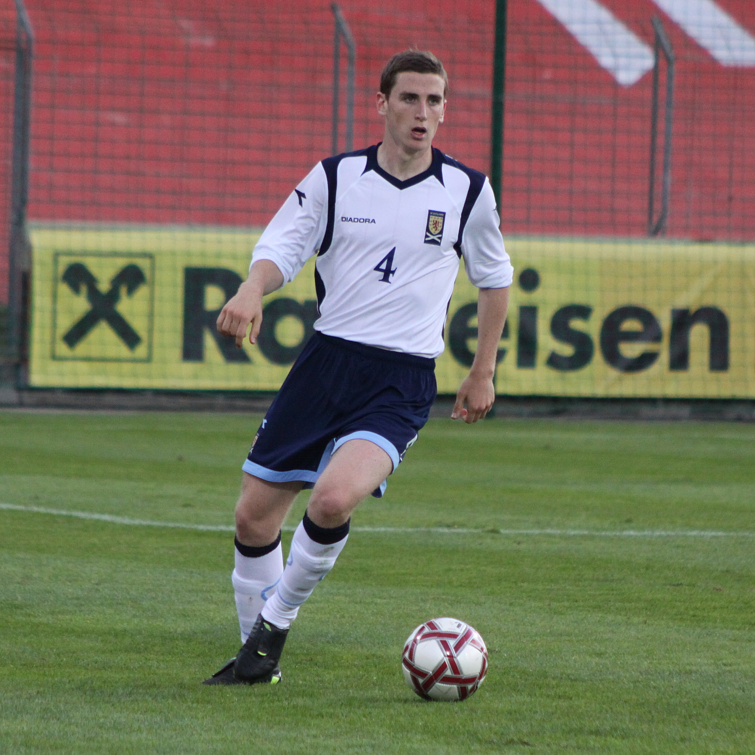 Paul Hanlon (Hibernian Edinburgh) - Schottische Fußballnationalmannschaft (U-21-Männer) Paul Hanlon (Hibernian F.C.) - Scotland national under-21 football team — (3)